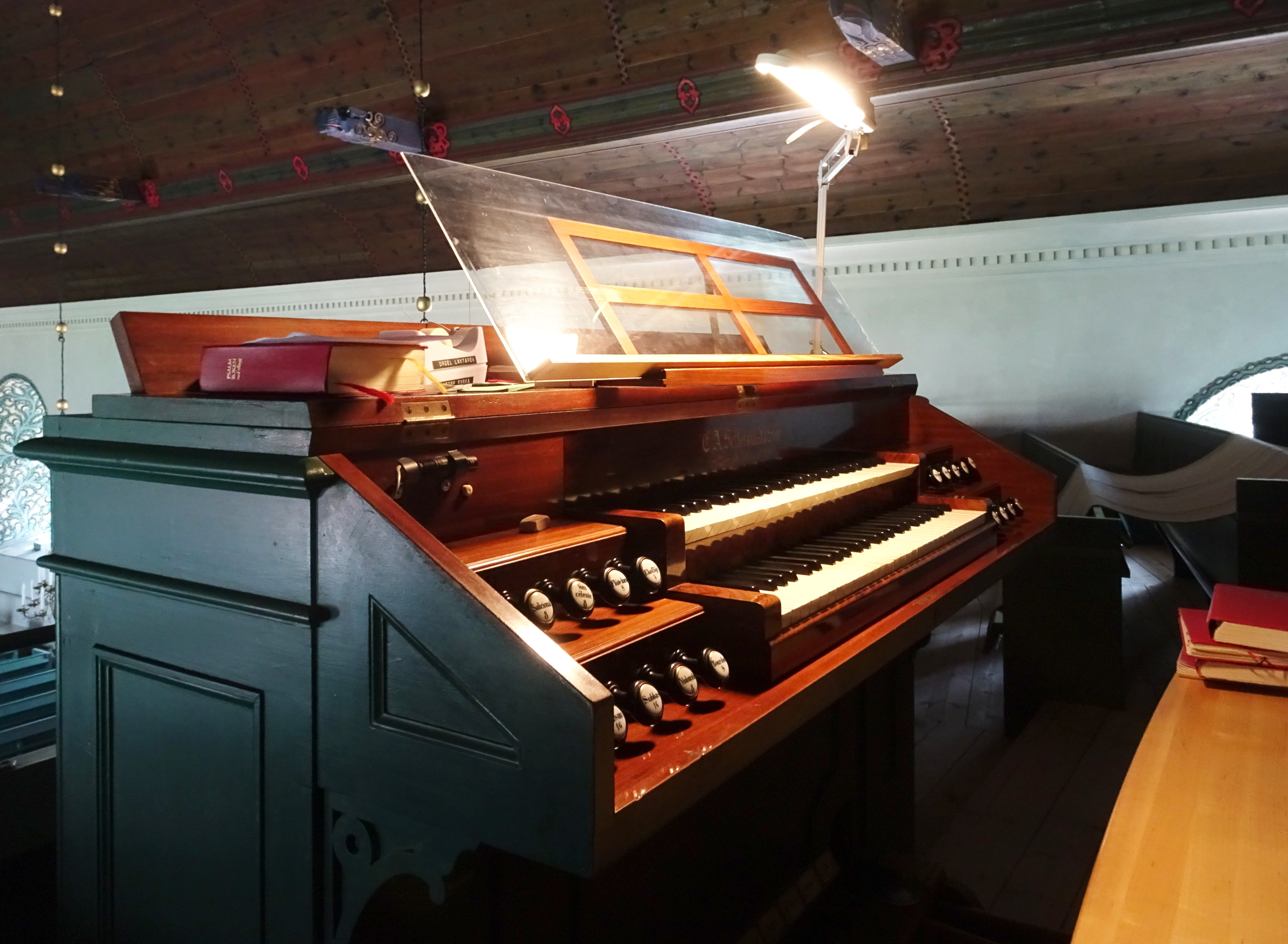 Ingatorps kyrka, interiör